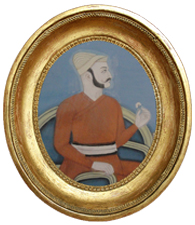 Muzaffar Jung